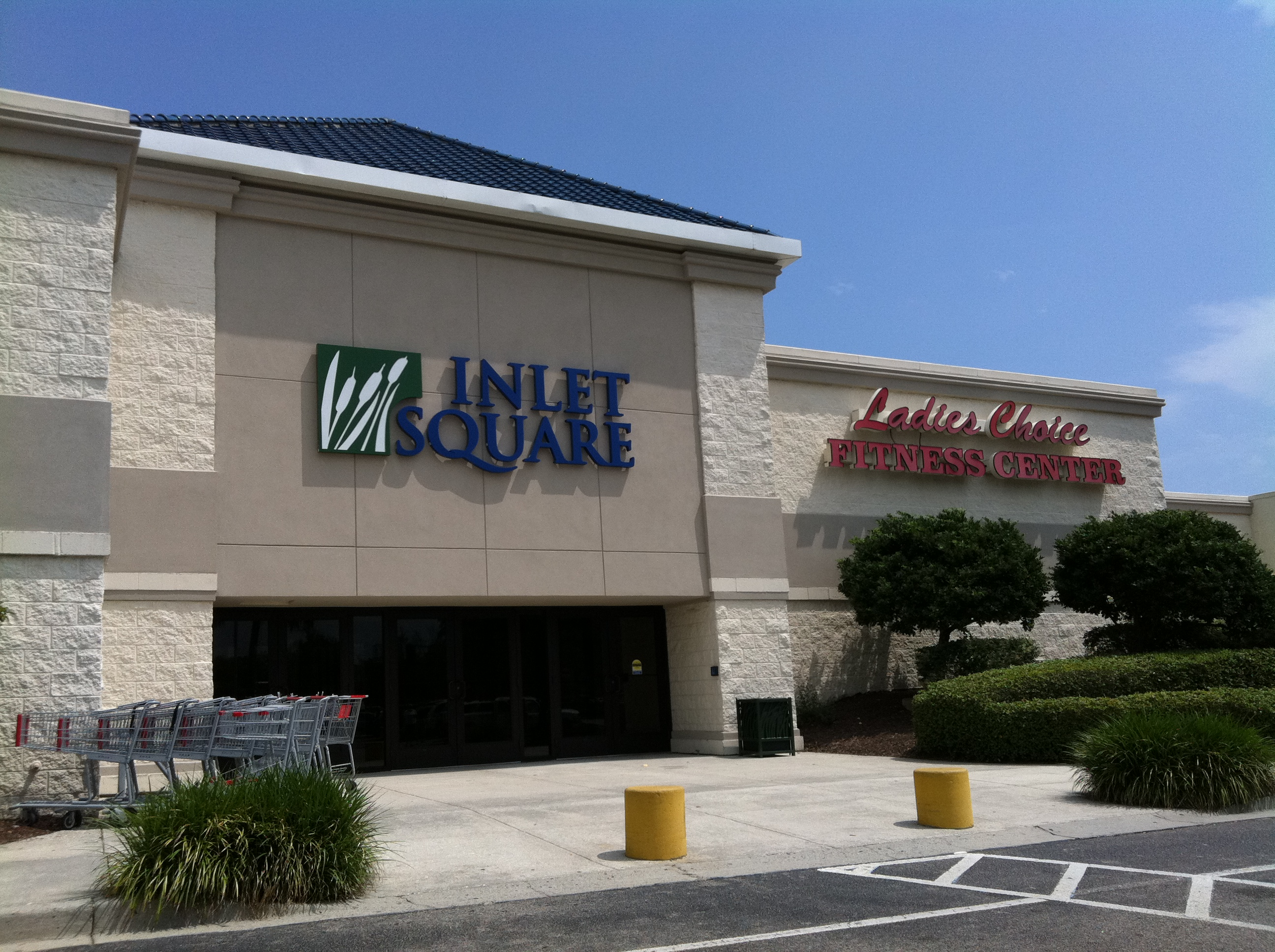 Inlet Square Mall